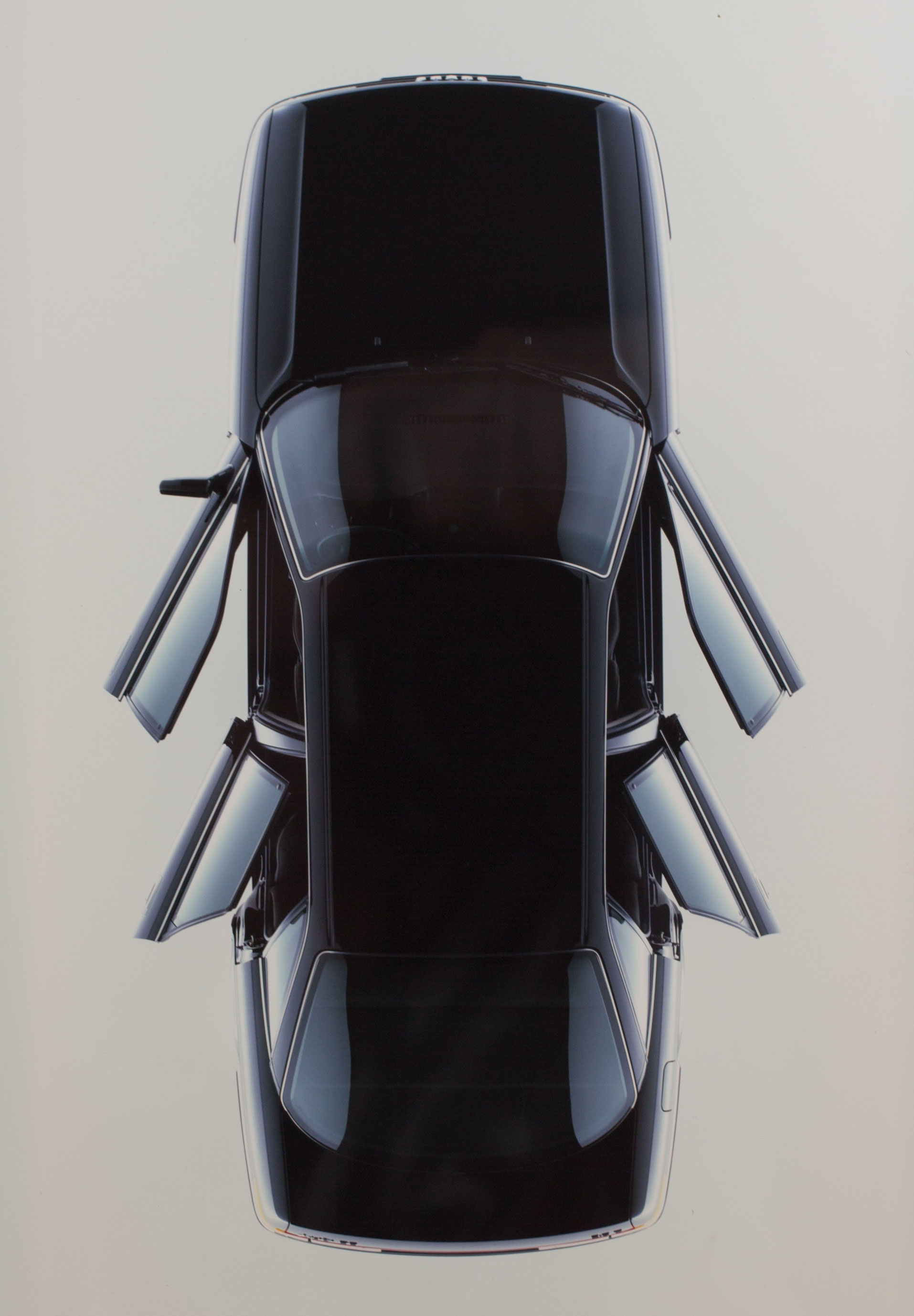 1985 erhielt Manfred Rieker einen künstlerischen Exklusivvertrag von Audi. Er entwickelte für die Aufnahmen exklusive Lichttechniken, die für 10 Jahre urheberrechtlich geschützt waren.